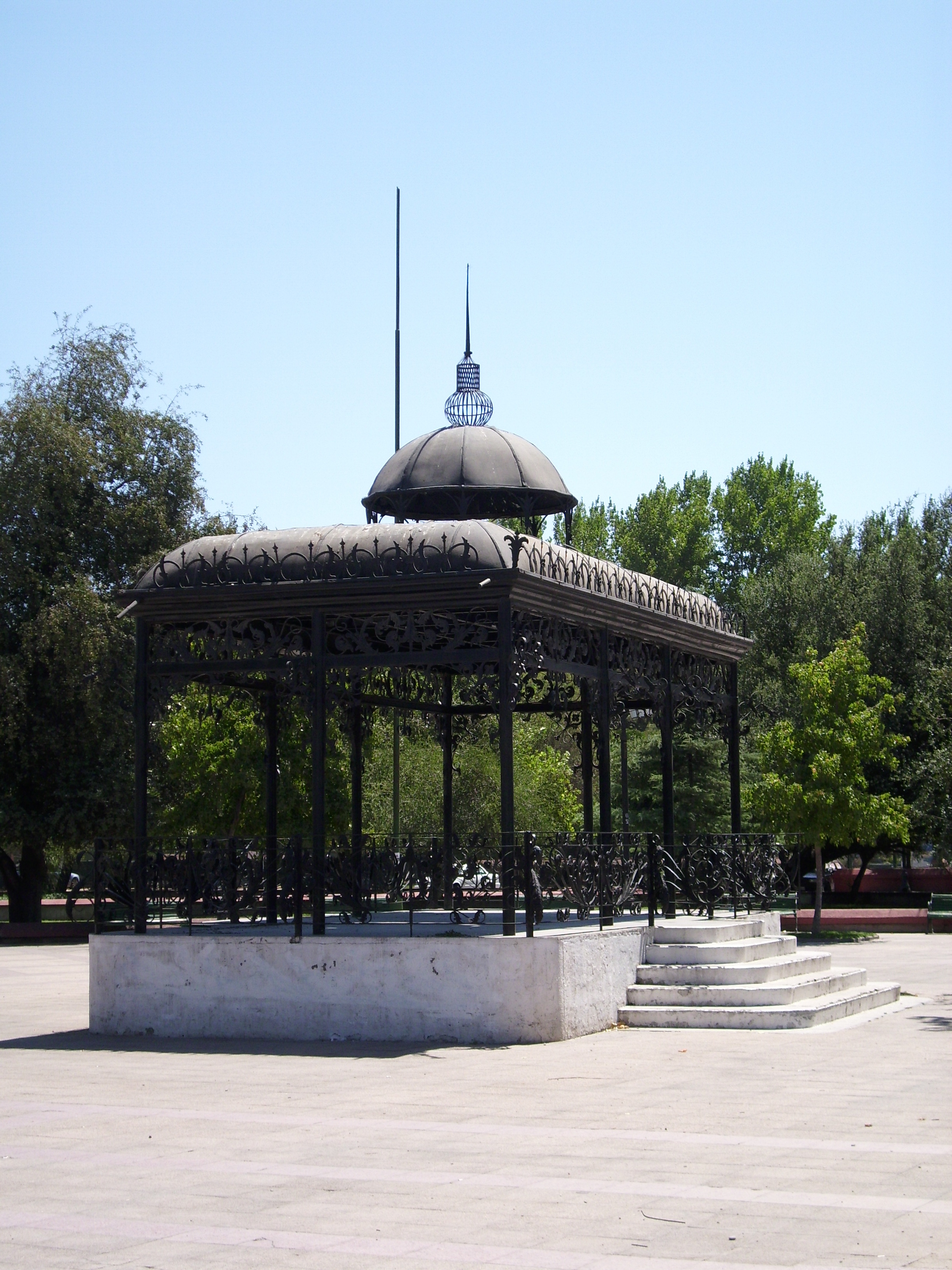 La glorieta ubicada en la Plaza de Armas de Maipú, en Santiago de Chile. 21 de febrero de 2010.